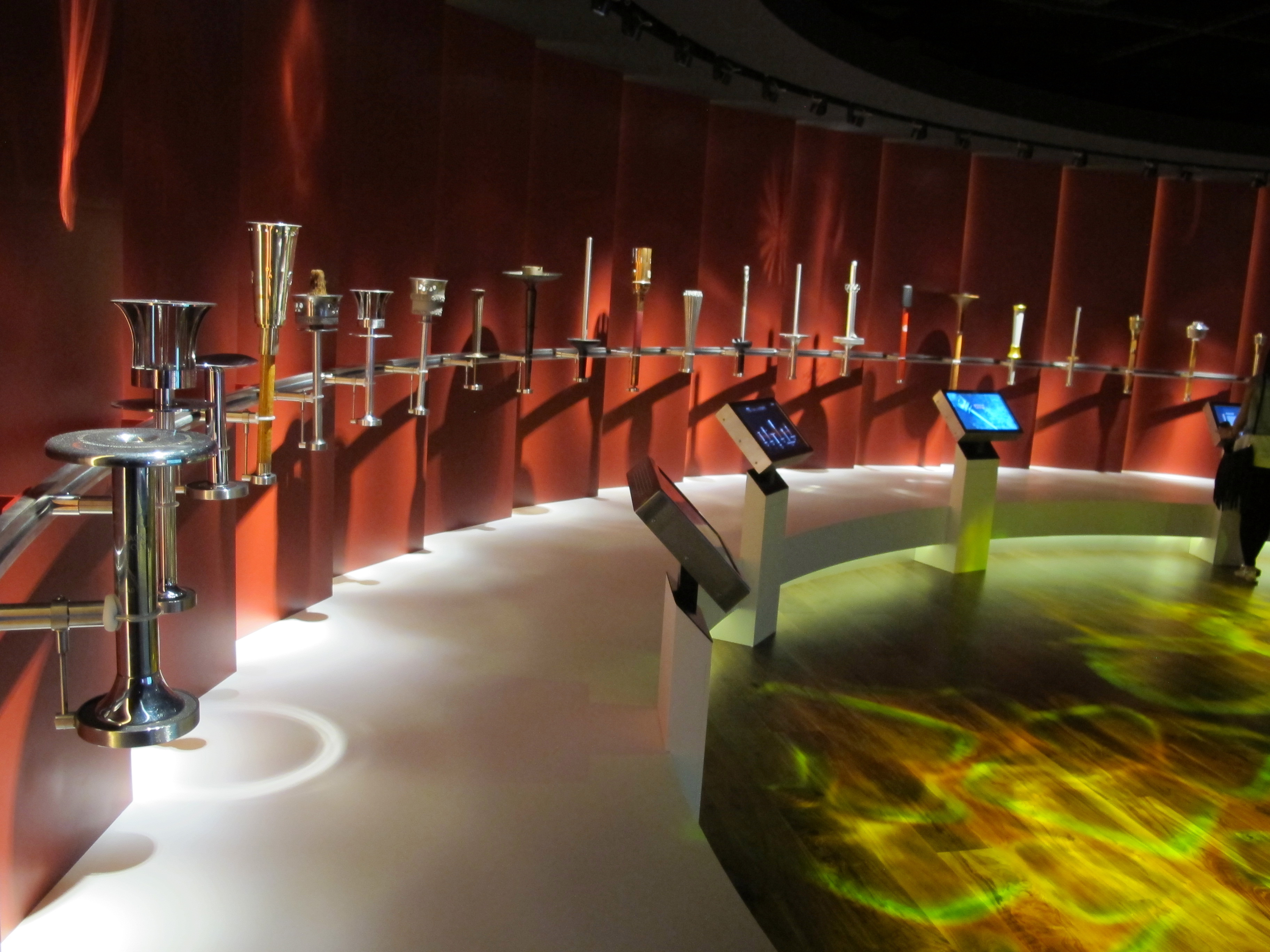 Musée Olympique, Losanna